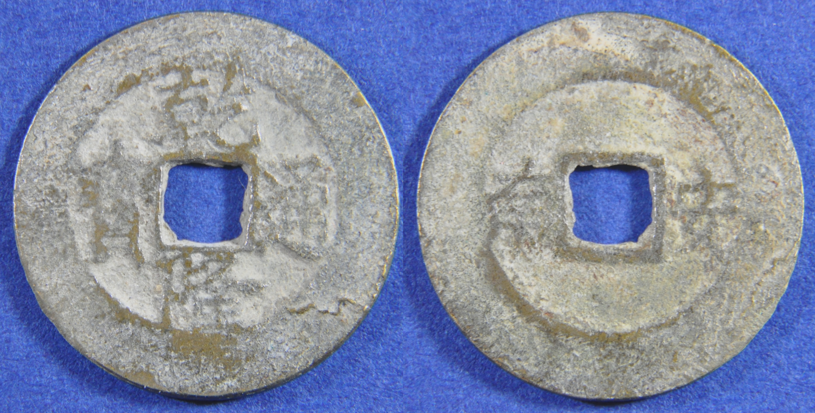 Une monnaie d'une sapèque en laiton de l'empereur Gao Zong ère Qian Long (1736-1795) de la dynastie Qing (1644-1912) pour le Dai Viet en 1788-1789. A/ Qian Long tong bao (Monnaie courante de l'ère Qian Long) R/ An Nam (actuellement Vietnam) Dimension : 24,34 mm Poids : 3,4 g. Remarque : Le Vietnam est indépendant de la Chine depuis le Xe siècle. Comment se fait-il qu'on puisse trouver une monnaie avec comme atelier "An Nam" ? En fait, en 1788, l'empereur du Dai Viet (ancien nom du Vietnam), Le Man De (1787-1789) se réfugie en Chine car il a essayé de se débarrasser des Tay Son, et en particulier, Nguyen Van Hue en 1788. Ce dernier se proclame empereur sous l'ère Quang Trung. Le général chinois, Sun Shiyi, prend le nord du Vietnam (le Tonkin) en 1788 et rétablit Le Man De. En 1789, il est battu par Nguyen Van Hue à la bataille de Dong Da et repart en Chine avec Le Man De qui meurt à Pékin en 1793. L'empereur Gao Zong reconnaît Nguyen Van Hue comme roi du Dai Viet. Cette monnaie a été fabriquée pour payer l'armée qui a envahi le Dai Viet en 1788-1789. Elle marque aussi une volonté politique d'assujettissement du Dai Viet à la Chine. Référence : Il n'a pas été facile de trouver des renseignements sur cette pièce de monnaie ! Elle ne se trouve dans "Cast Chinese Coins" de David Hartill ni dans le catalogue des monnaies vietnamiennes de François Thierry (BNF, 1988). Je l'ai trouvée dans "A working aid for Collectors of Annamese coins compiled by John A. Novak". Schroeder #445; Showa-97; Toda #212 Indice de rareté : peu commune